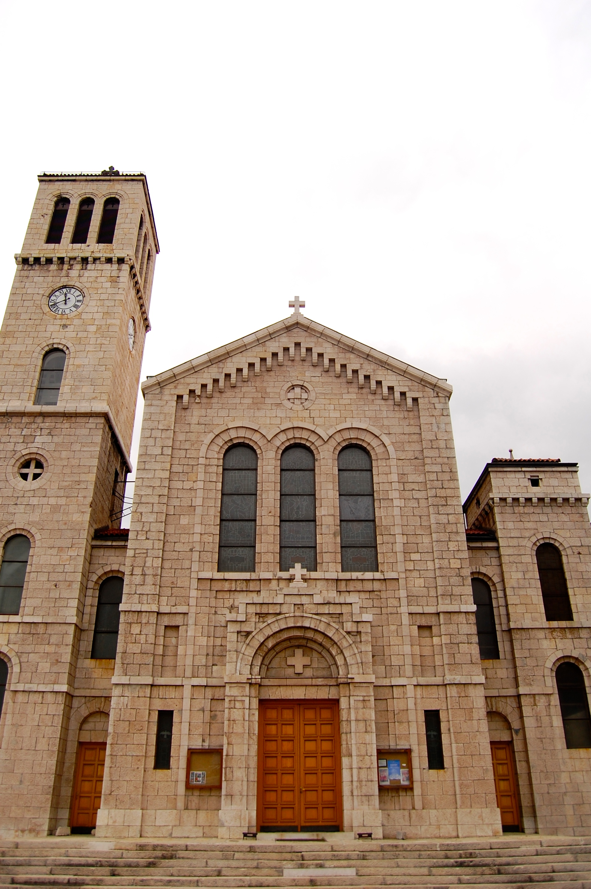 Sarajevo Church